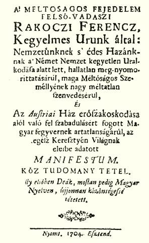 Rákóczi "recrudescunt inclytae gentis Hungarae vulnera" (megújúlnak a dicsőséges magyar nemzetnek régi sebei) kezdetű manifesztuma magyar nyelvű kiadásának címlapja